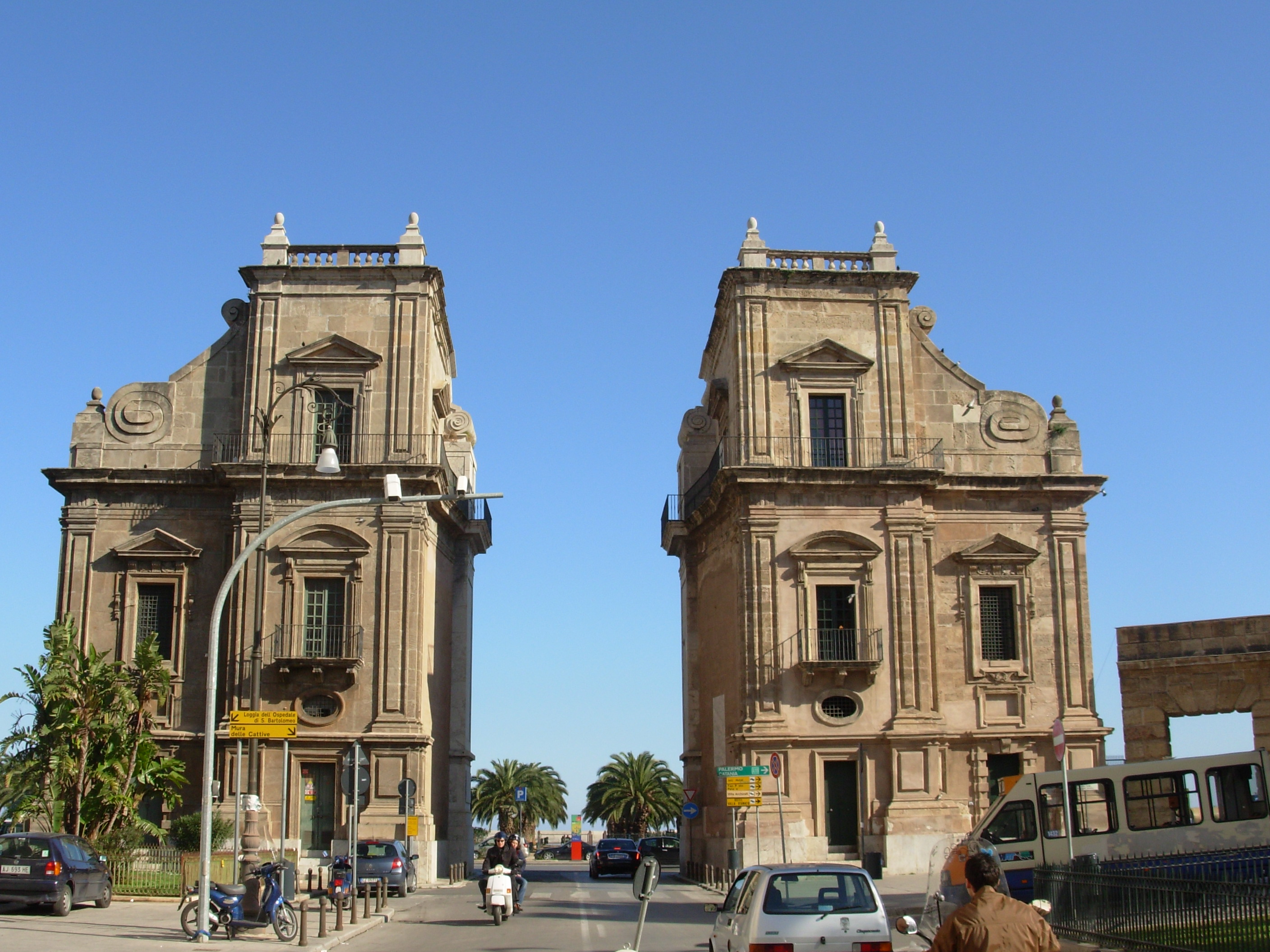 Porta Felice, l'ordine barocco che si affaccia su Piazza S. Spirito. by Hszeee